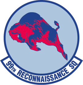 99th Reconnaissance Squadron emblem